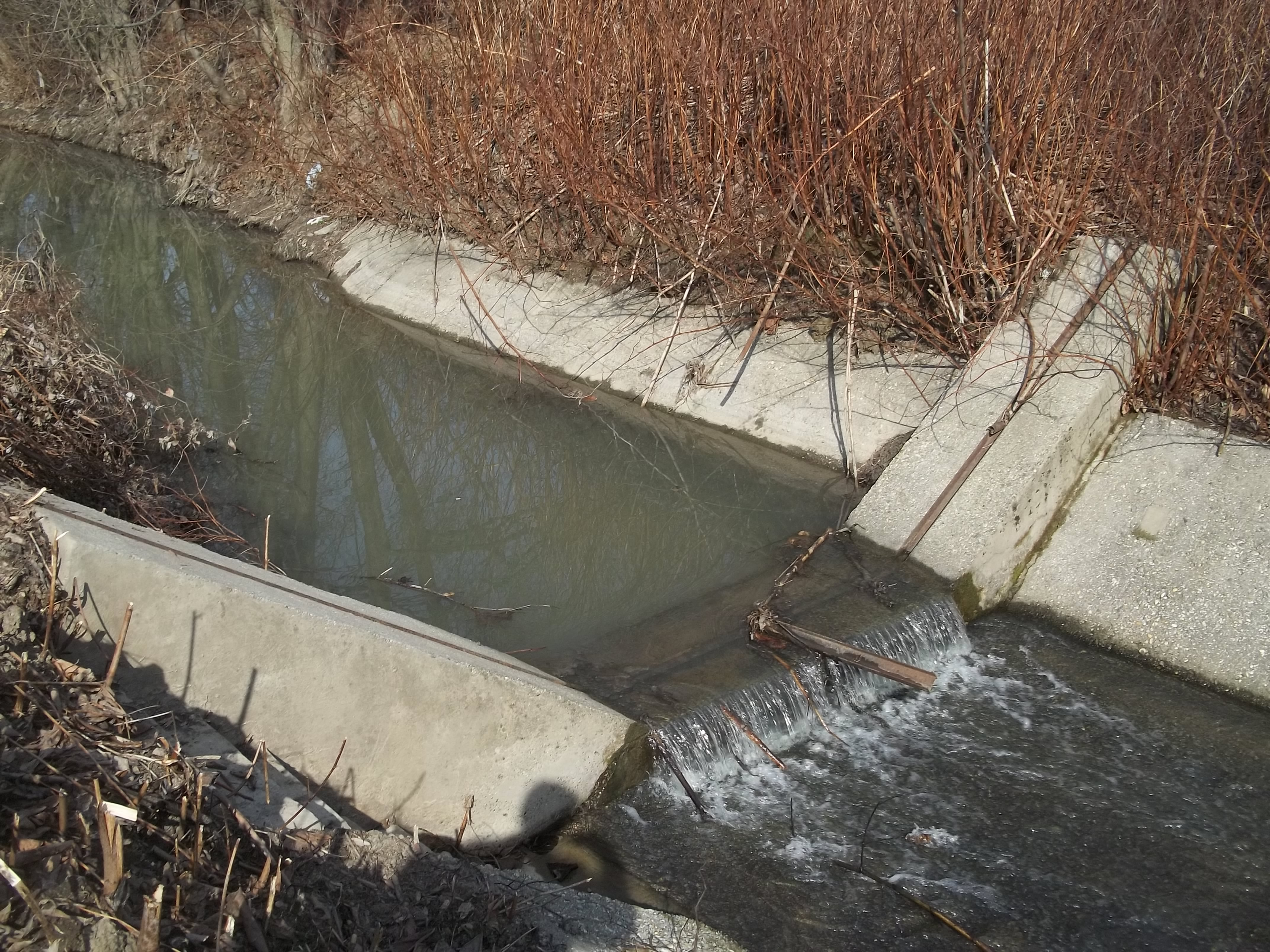 Veperec v Súdovciach